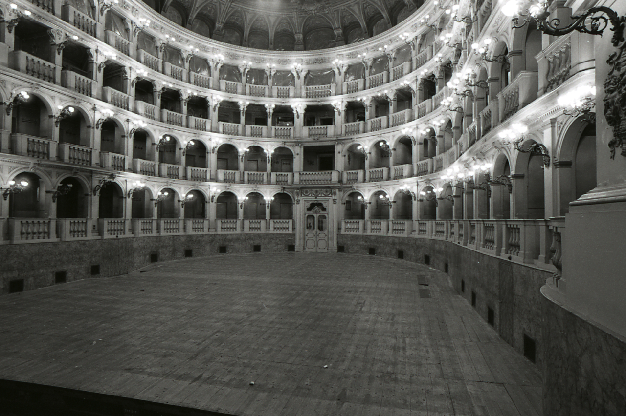 Servizio fotografico : Bologna, 1980 / Paolo Monti. - Strisce: 2, Fotogrammi complessivi: 10 : Negativo b/n, gelatina bromuro d'argento/ pellicola ; 35 mm. - ((Sul portanegativi: N[I]K[MA]T FP4. - La serie è identificata da Monti con segni grafici e distinta dalla successiva. - Occasione: Documentazione per i lavori di restauro. - Fonte: Agenda di Paolo Monti: Nikon Leika 3001-/ Monti 1978 (1978), presso Archivio Paolo Monti